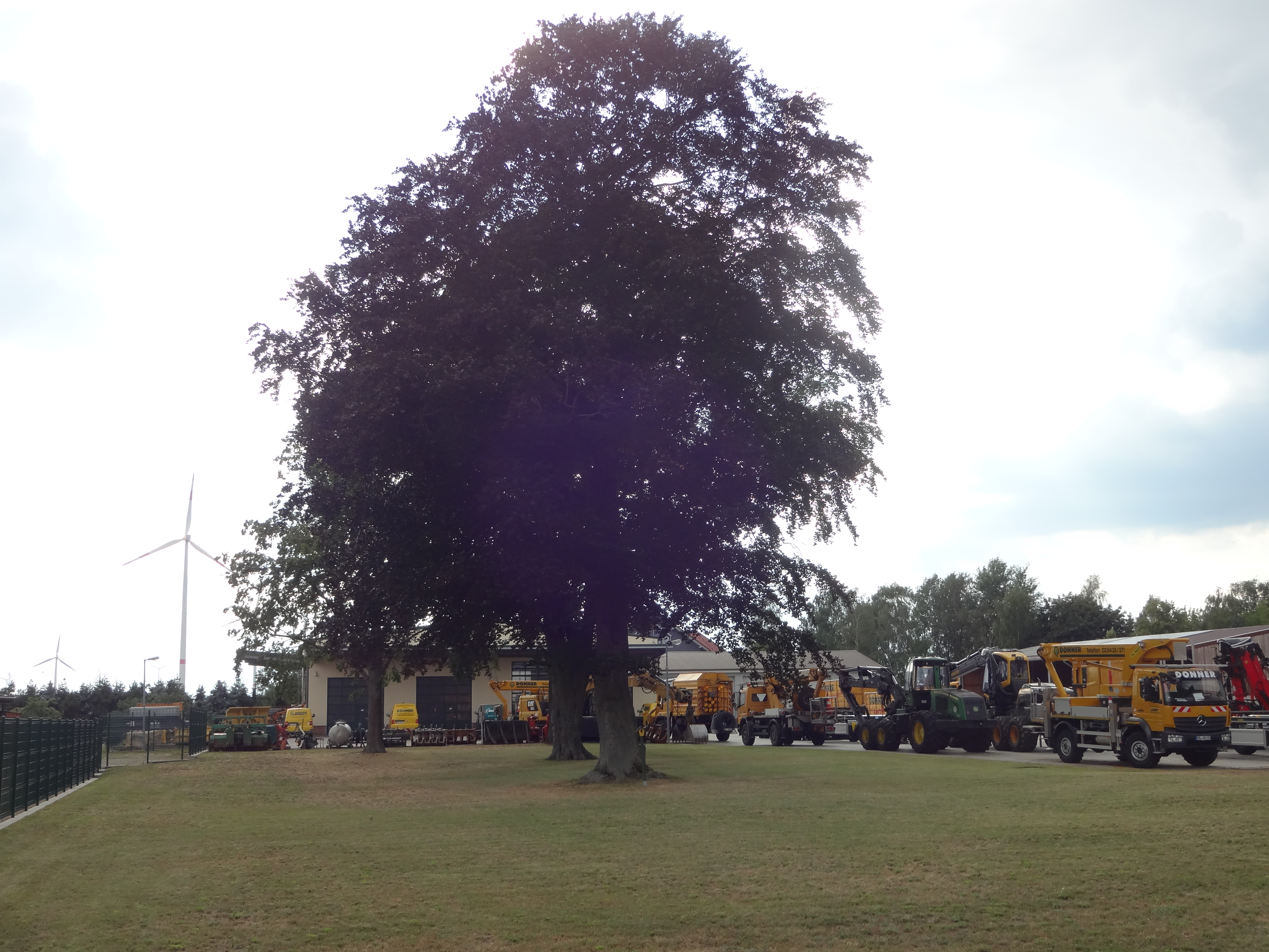 Naturdenkmale Rotbuche und Blutbuche in der Ortsstraße 21 in Saadow